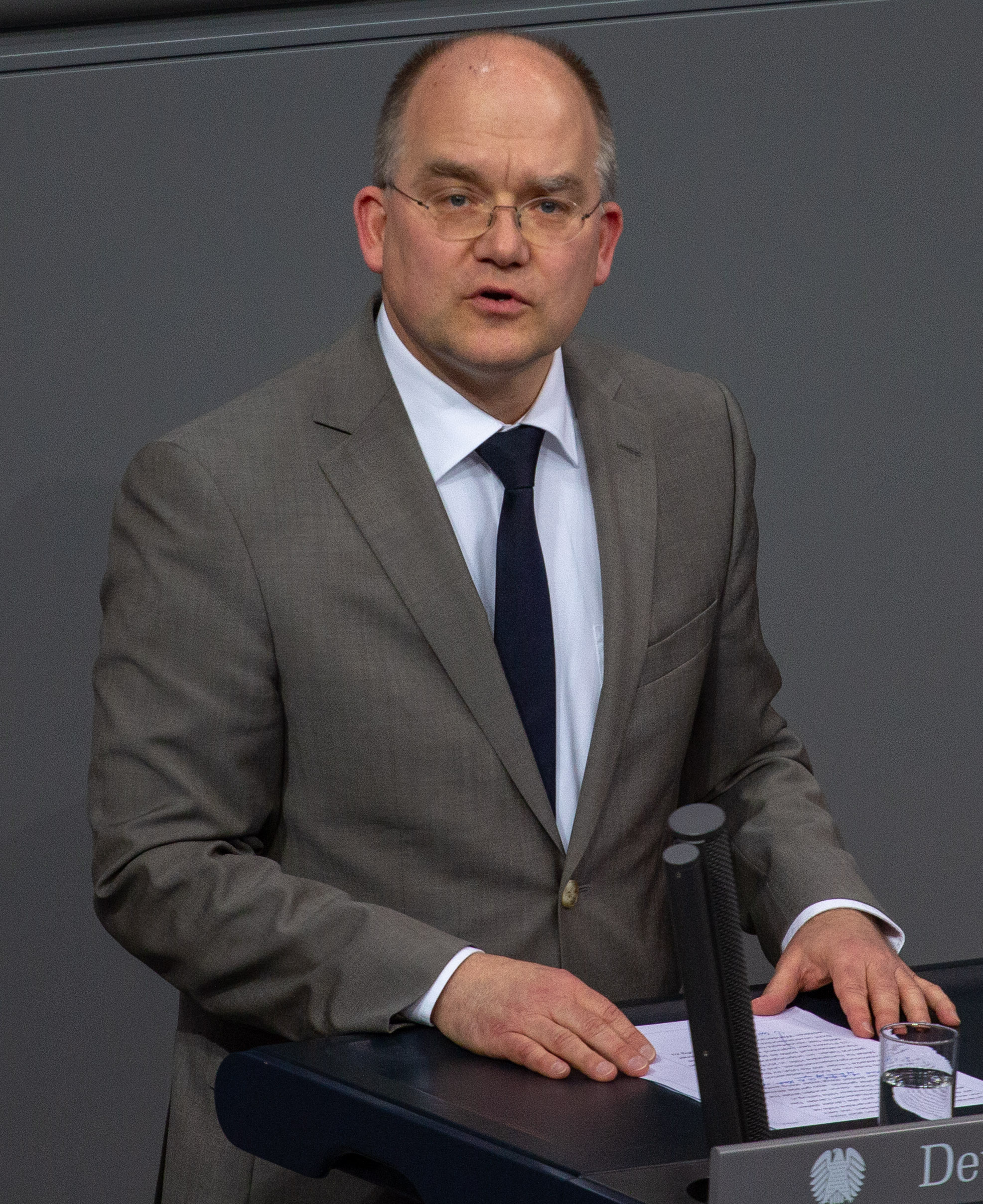 Sebastian Brehm, Mitglied des Deutschen Bundestages, während einer Plenarsitzung am 11. April 2019 in Berlin.